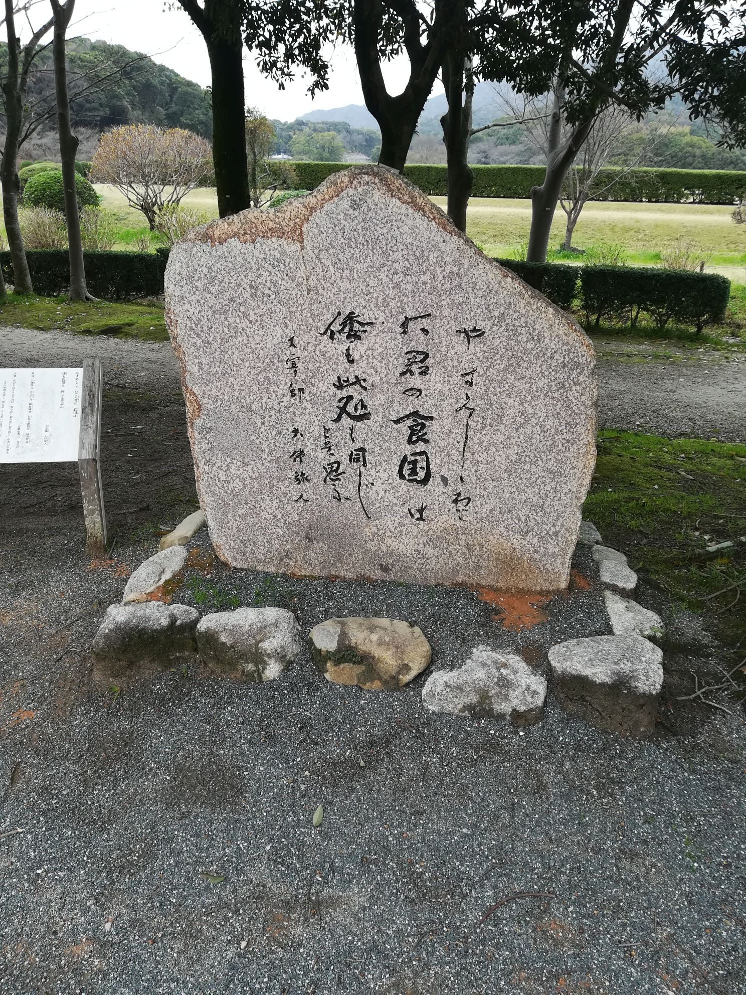 福岡県太宰府市・大宰府政庁跡前にある大伴旅人の歌碑 「やすみししわご大君の食国は 倭も此処も同じとそ思ふ」